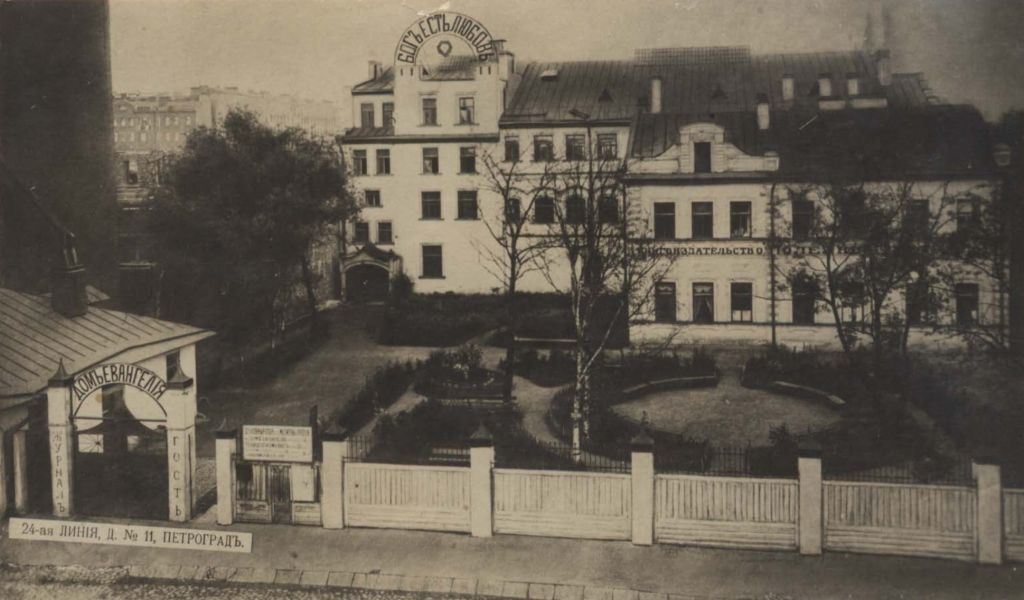 Фасад Дома Евангелия